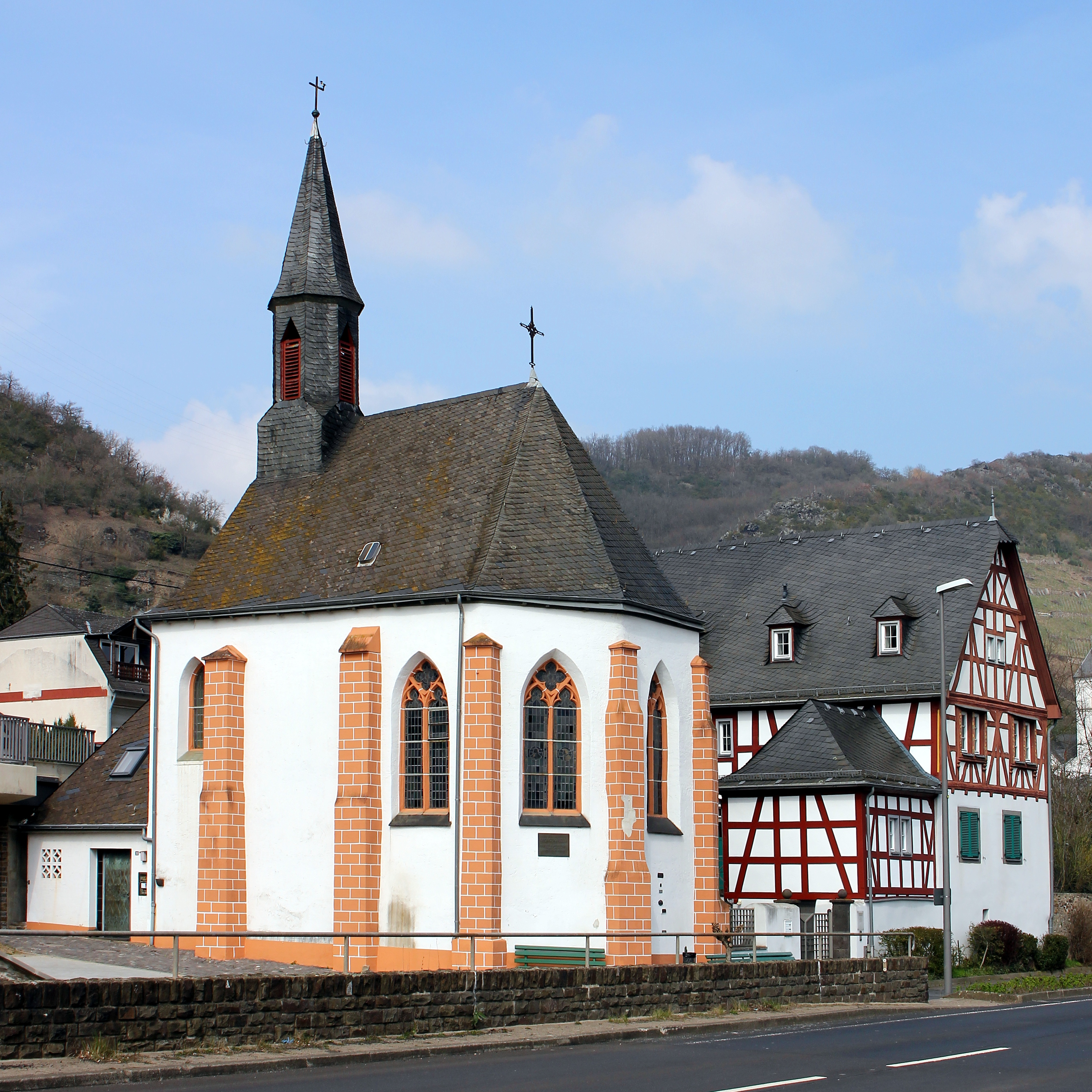 Georgskapelle in Karden, Moselstraße, erbaut um 1340, zum Stift St. Castor gehörend, 1805 nach der Enteignung durch die französische Verwaltung profaniert und als Pferdestall zweckentfremdet, 1856 zur evangelischen Kirche umgebaut und 1857 eingesegnet, 1908/09 grundlegend restauriert. Seit 1968 heißt sie wieder Georgskapelle.